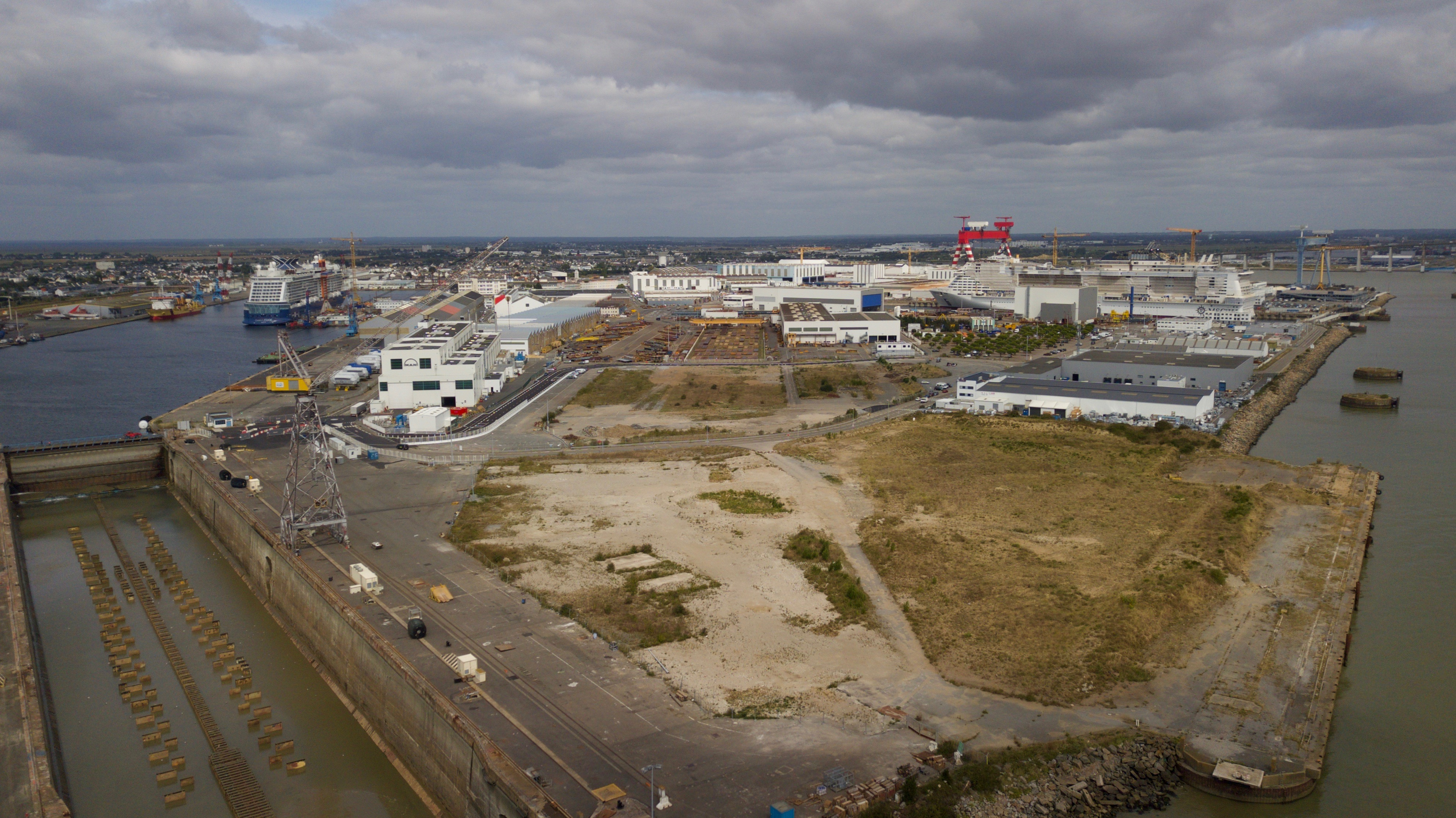 Vue large des chantiers de l'Atlantique. On distingue la forme Joubert au premier plan à droite.